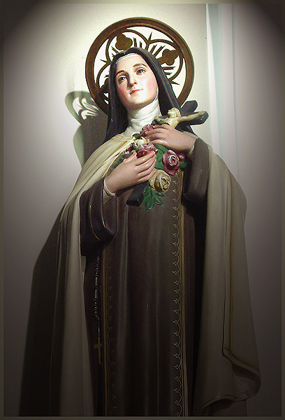 Imagem de Santa Teresa na Capela do Bonfim, Porto Alegre, Brasil.